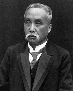 徐世昌（1855－1923）